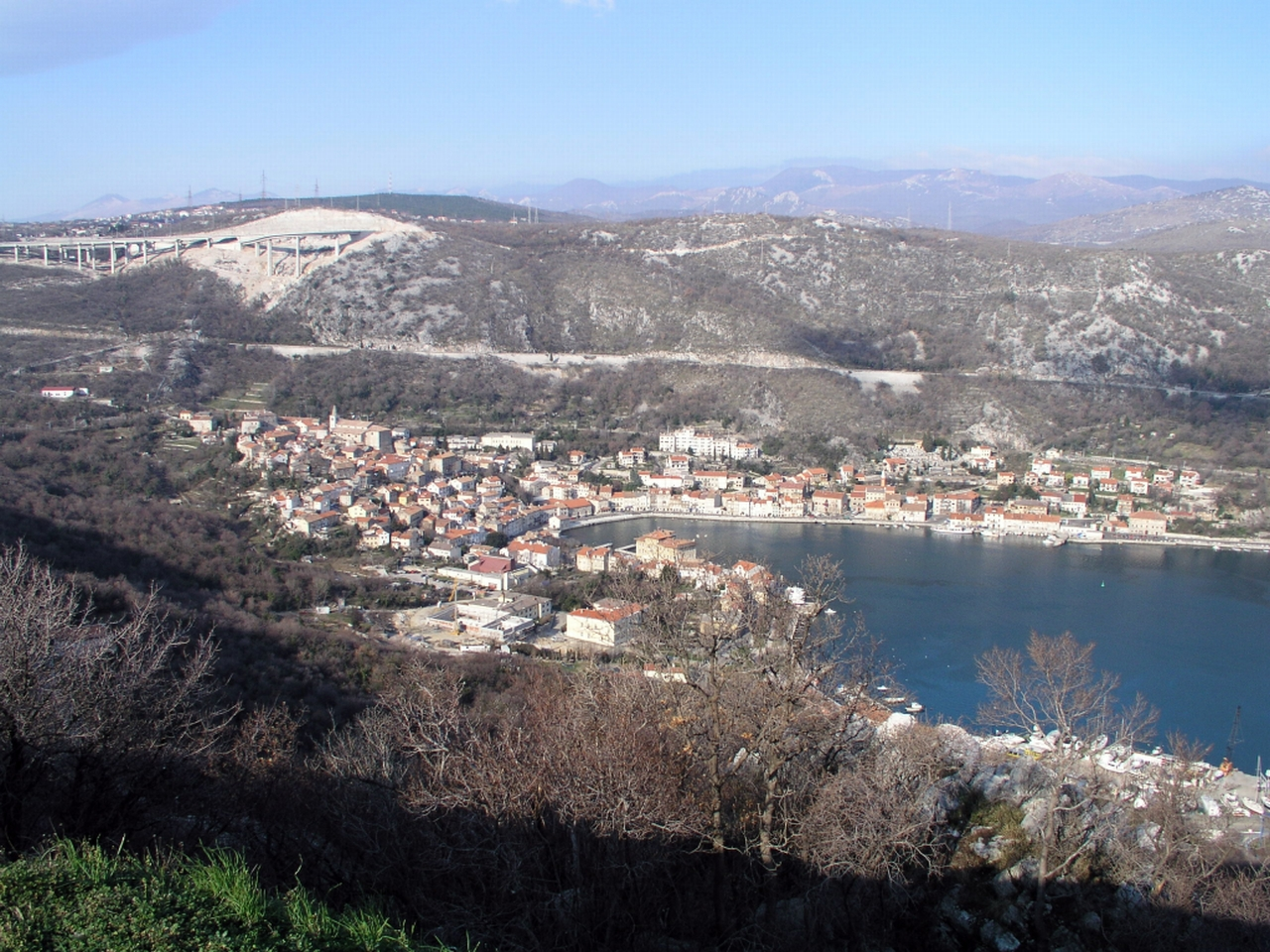 Bakar, Hrvatska